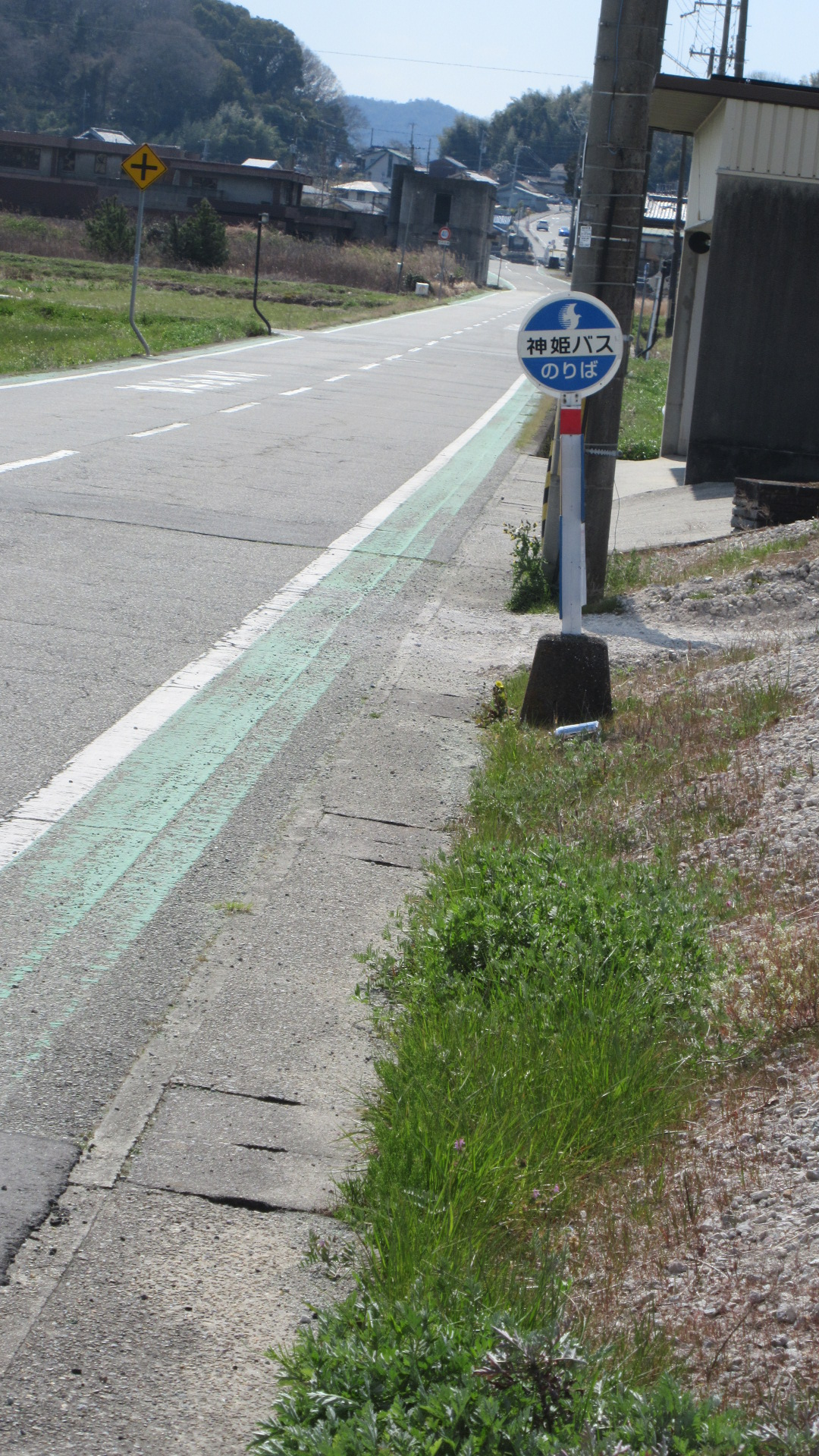 神姫バス細工所西口停留所（2020年4月1日廃止）